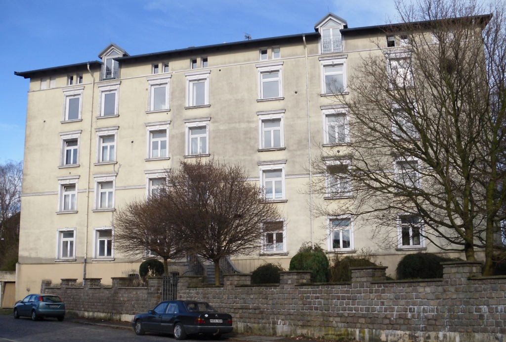 Westflügel des Schlosses Harburg in Hamburg-Harburg